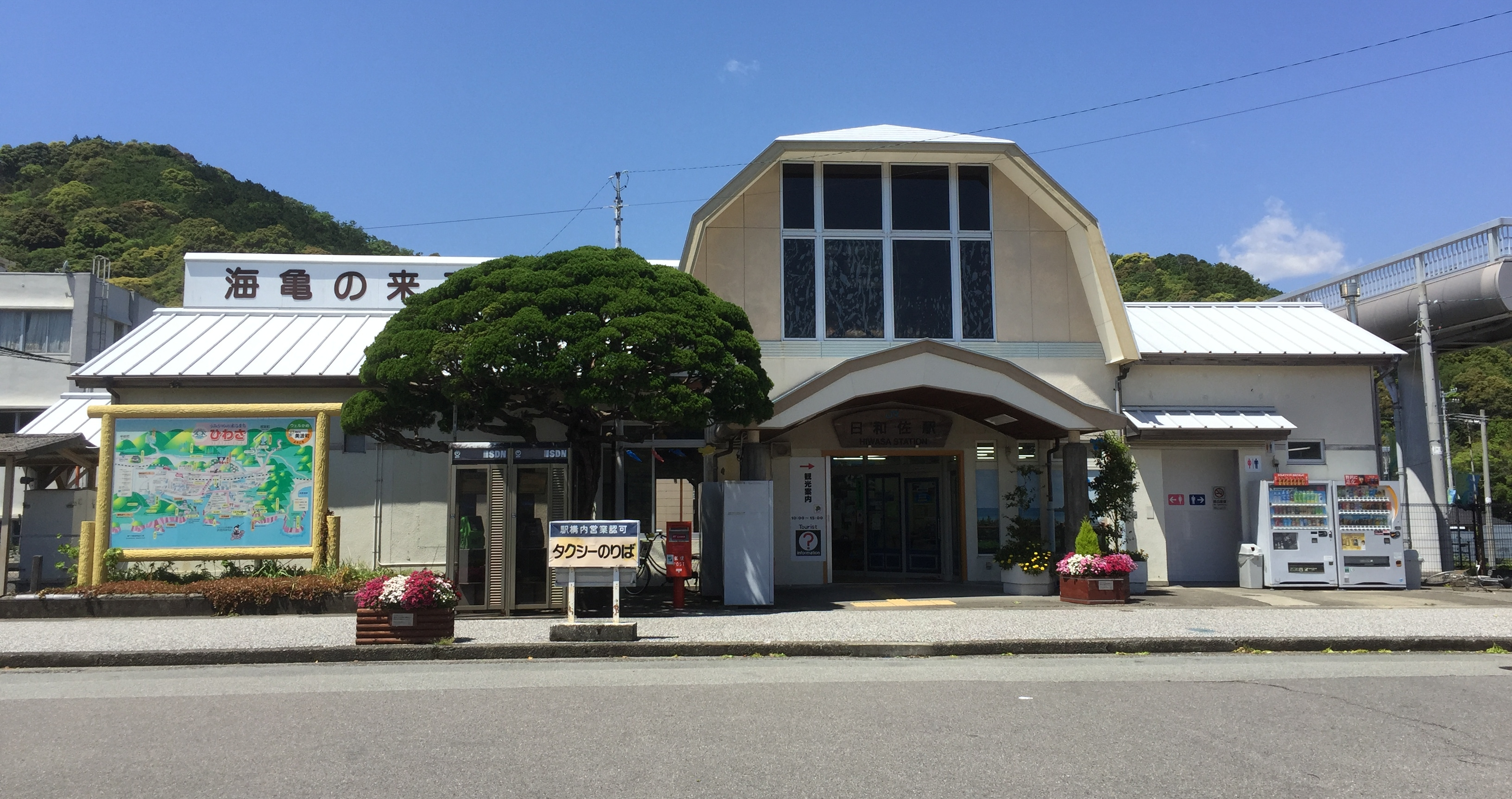 日和佐駅駅舎